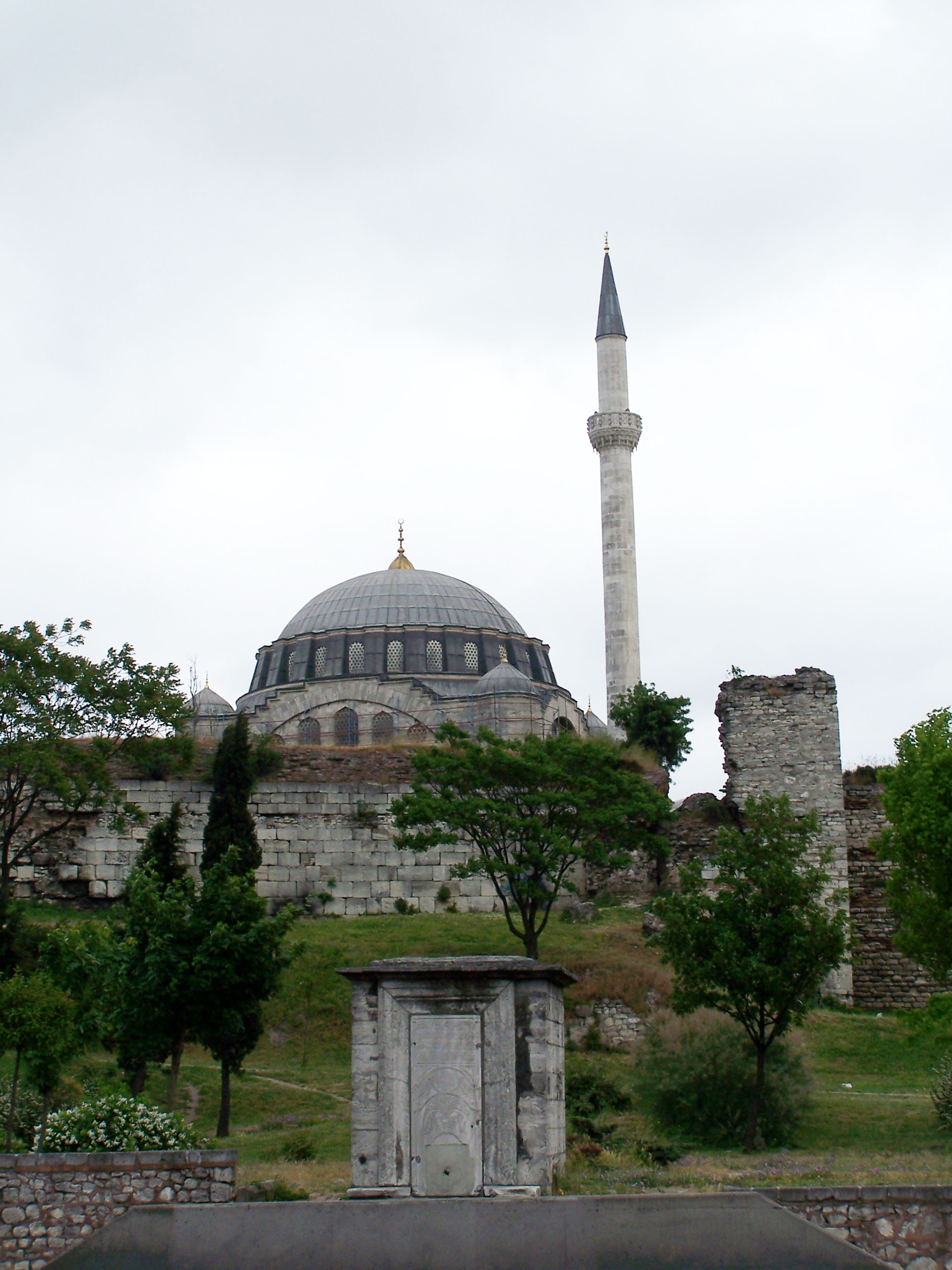 Mihrimah Sultan Camii and İstanbul Surları (Walls of Constantinople) in Edirnekapı, Fatih